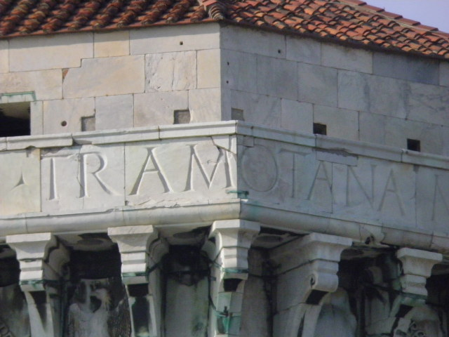 Ogni anglo che coincide tra due facciate indica la direzione di un vento, in questo caso il vento di Tramontana.